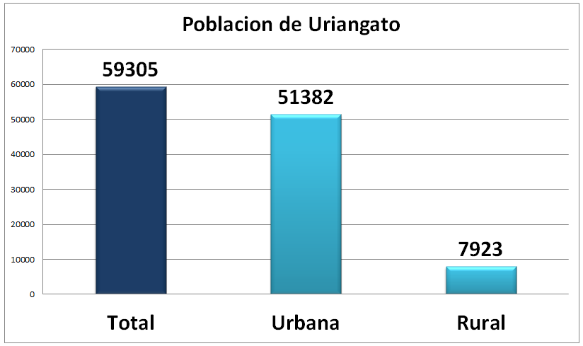 Galicia Uriangato, Guanajuato